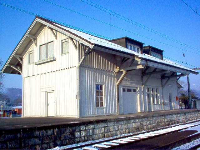 Stationsgebäude Classe V "Weiach-Kaiserstuhl", Baujahr: 1876, Bauherr: Schweizerische Nordostbahn